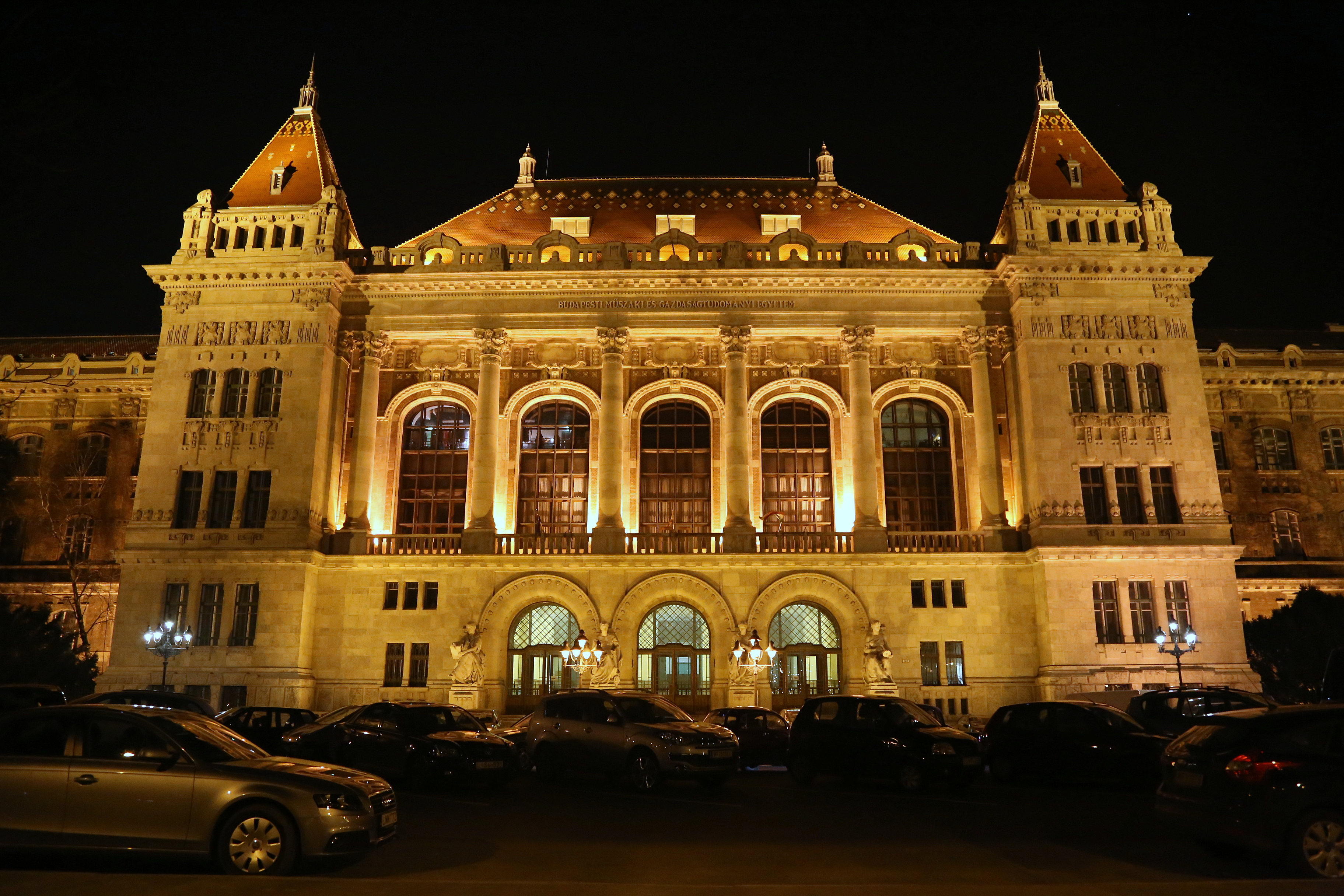 Budapesti Műszaki Egyetem K épülete This is a photo of a monument in Hungary. Identifier: 1110